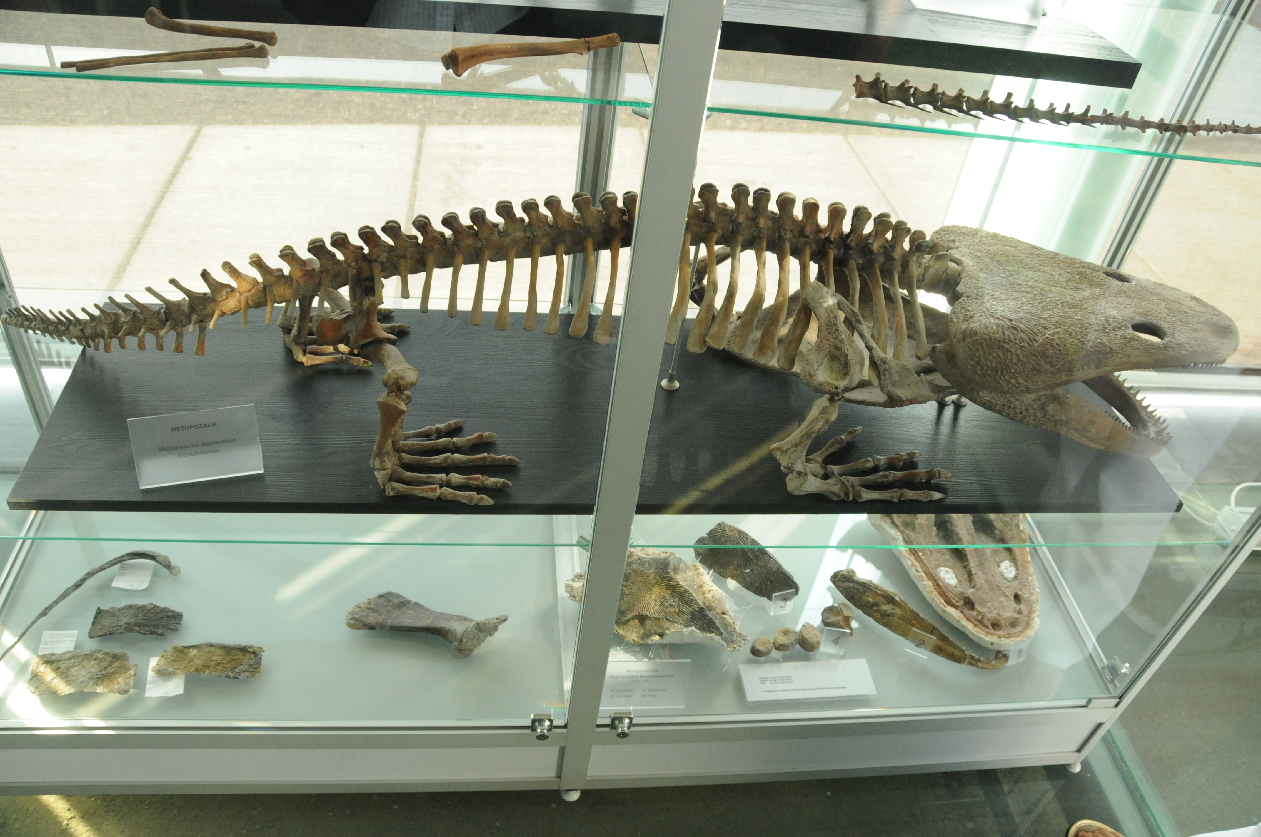 Szkielet Metopozaura w dinoparku w Krasiejowie